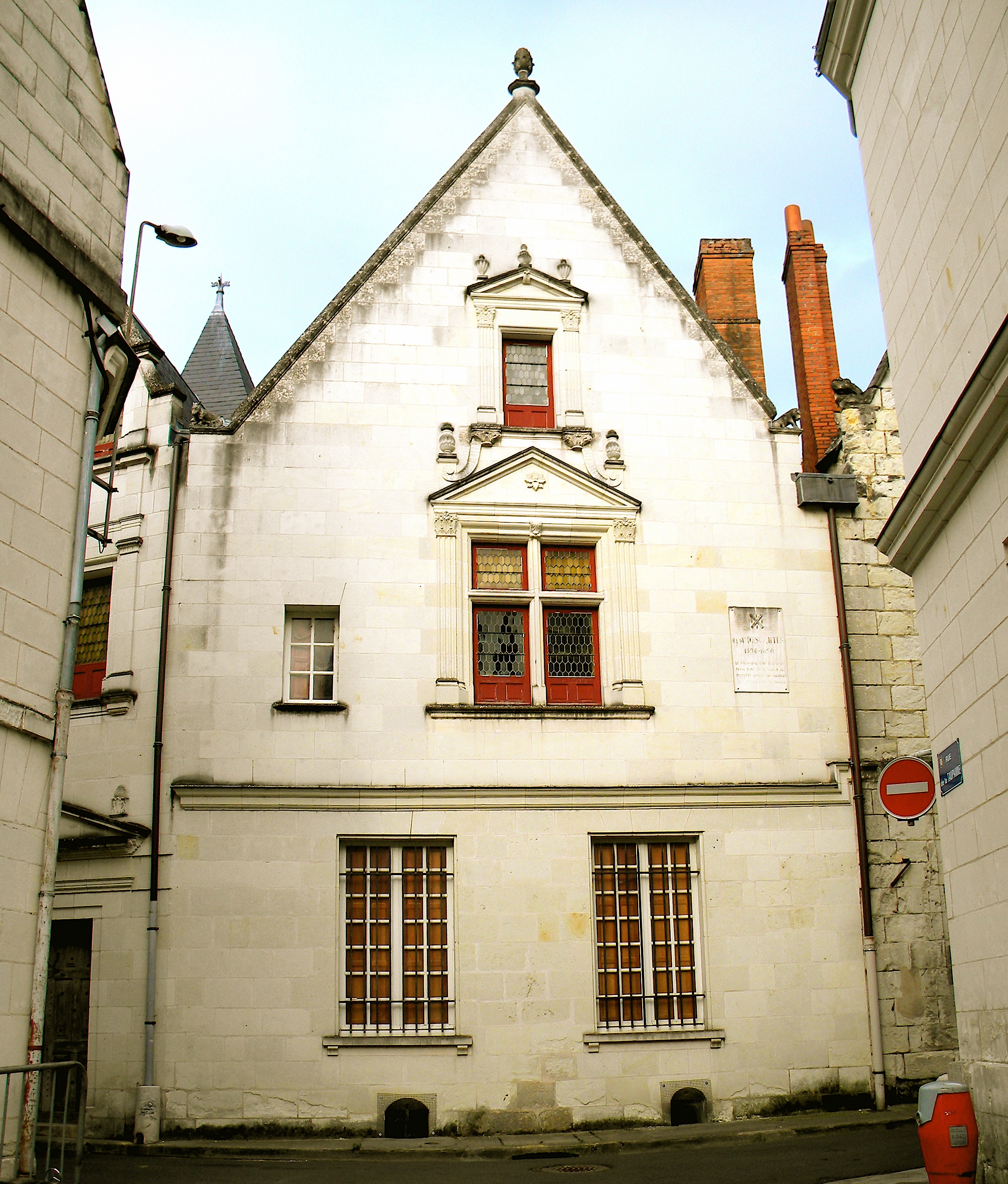 Maison natale de René Descartes, 31 mars 1596 - 11 février 1650, qui est un mathématicien, physicien et philosophe français. Il est considéré comme l'un des fondateurs de la philosophie moderne. Il a écrit Le Discours de la méthode en 1637. .